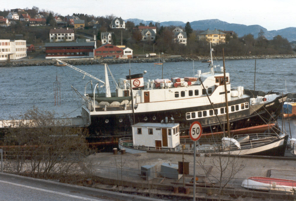 MS Halsnøy, built 1957.